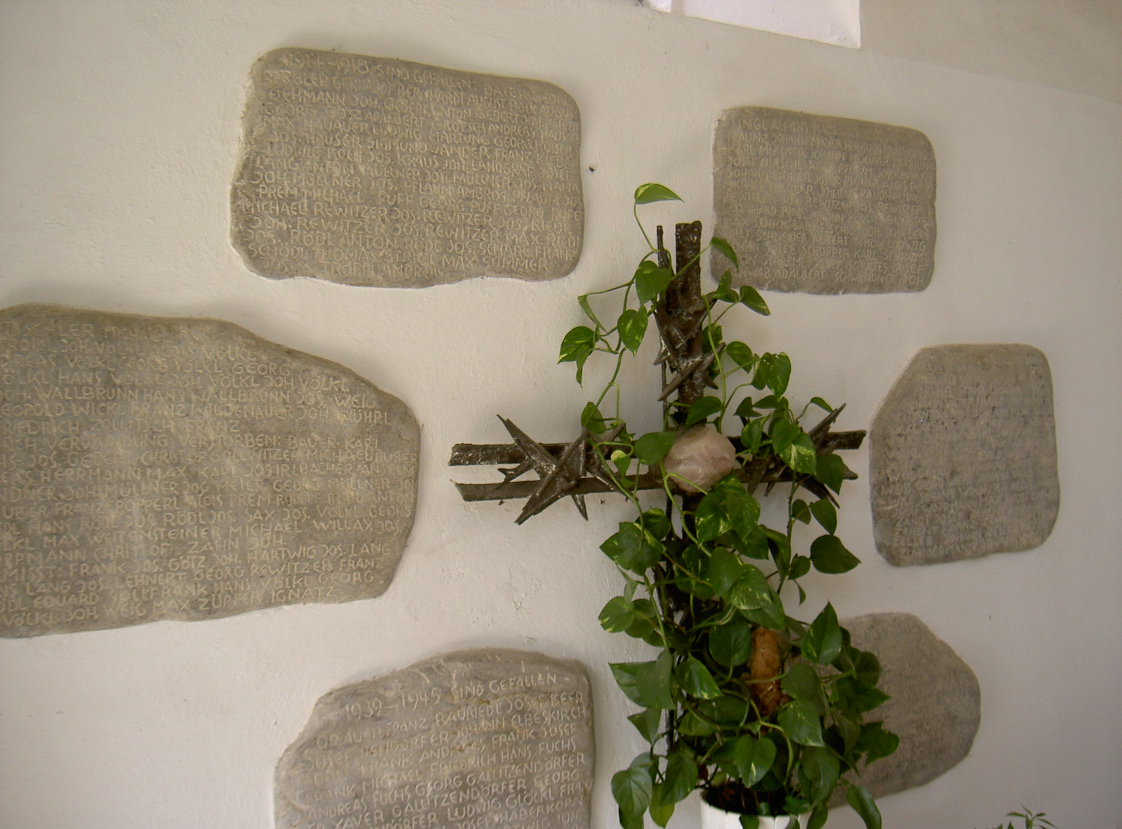 Friedhofskapelle in Pleystein